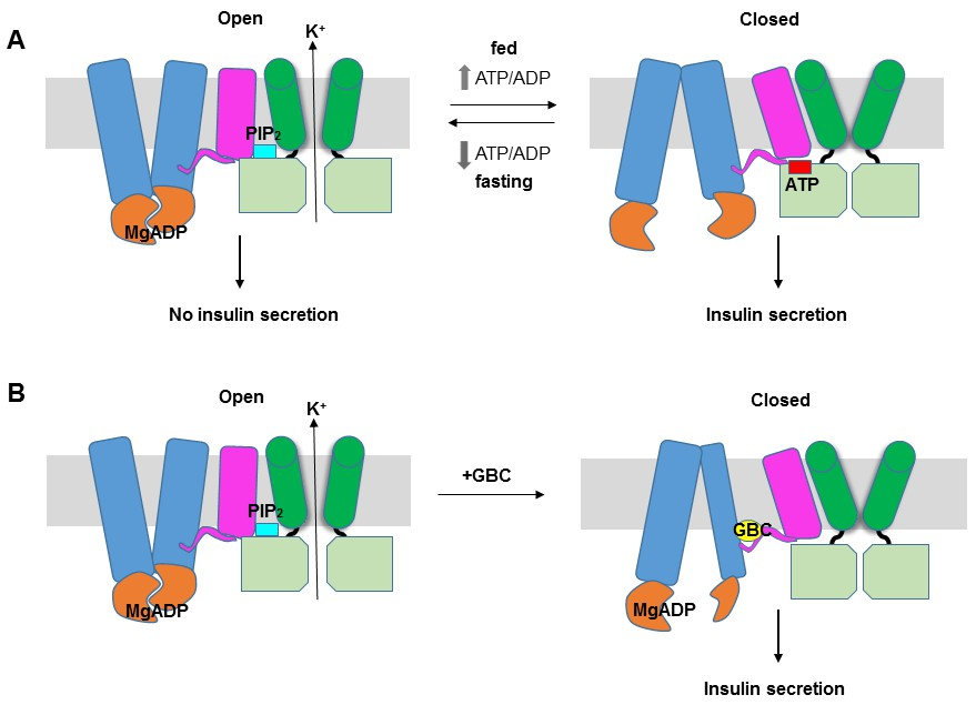 KATP channel gating model. (A) Cartoon illustrating how changes in the ATP/ADP ratio upon feeding and fasting alter the equilibrium between the inward-facing and outward-facing states of the SUR1-ABC core and interactions of the channel with ATP and PIP2 to control channel activity. (B) Model of the hypothesized mechanism whereby GBC causes misalignment of the NBDs to prevent Mg-nucleotides activation of KATP channels. In both A and B, Kir6.2 transmembrane helices: green; Kir6.2 cytoplasmic domain: lime green; SUR1-TMD0/L0: magenta; SUR1-TMD1/2: blue; SUR1-NBDs: orange; GBC: yellow; ATP: red; PIP2: cerulean. Note the different states shown are not meant to reflect the actual conformational transitions.